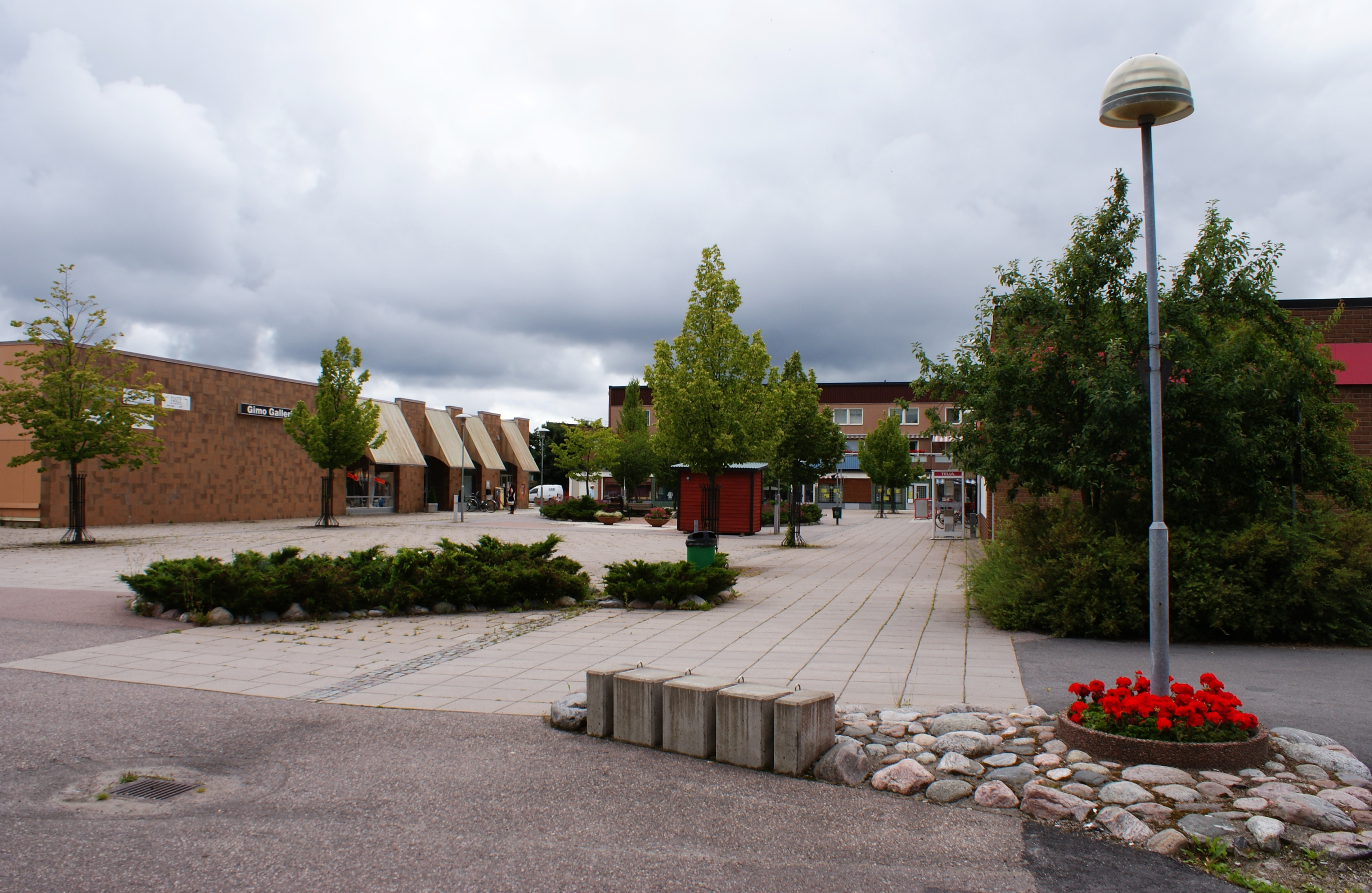 Gimo centrum